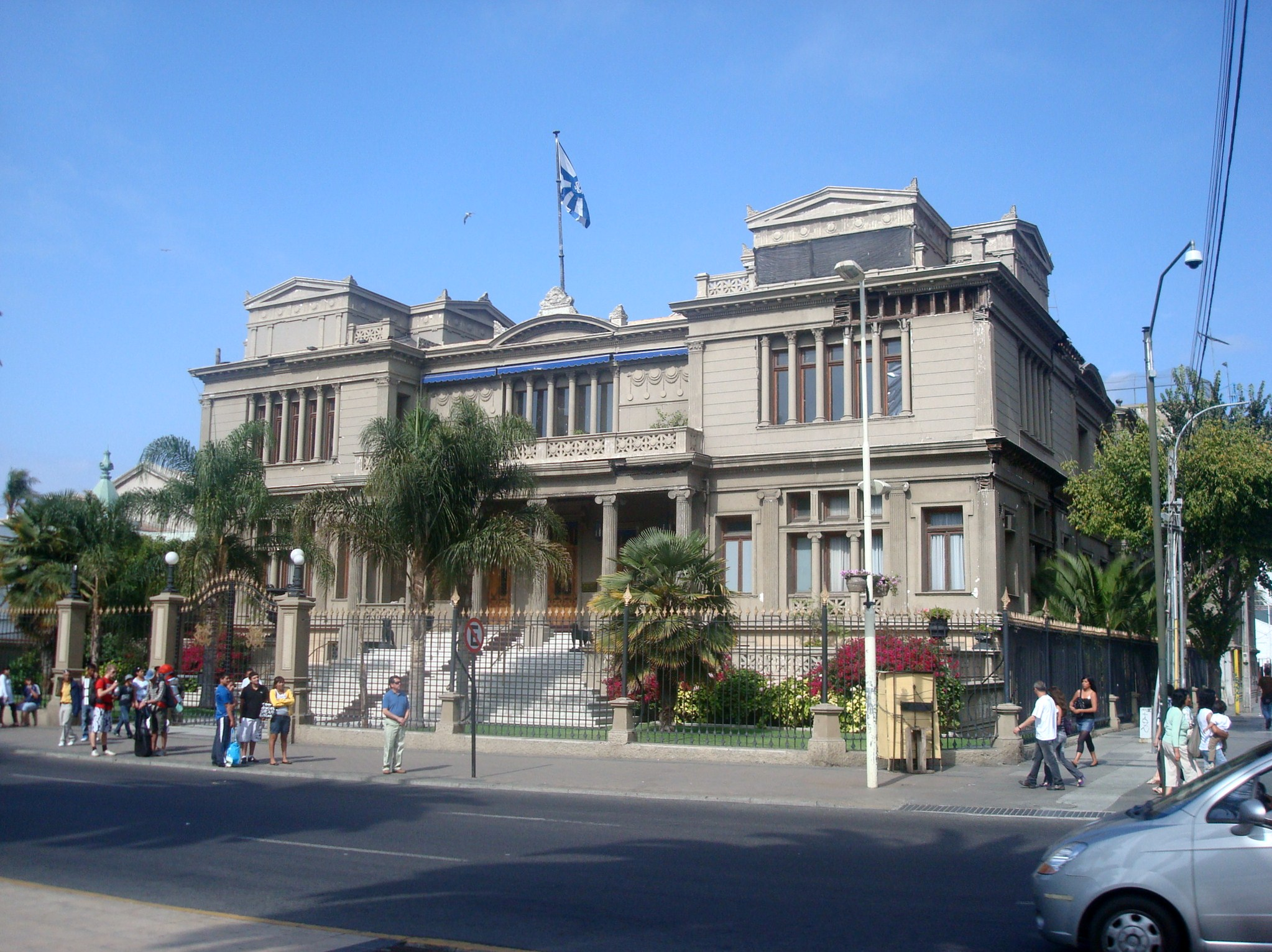 Club de Viña del Mar, Viña del Mar, Chile